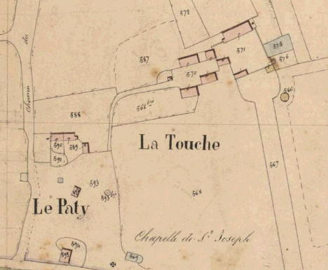 Plan Ancien Cadatre 1844